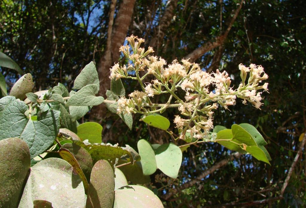 Mikania argyreae - ASTERACEAE - Parque Nacional de Brasília - Distrito Federal - Brasil.